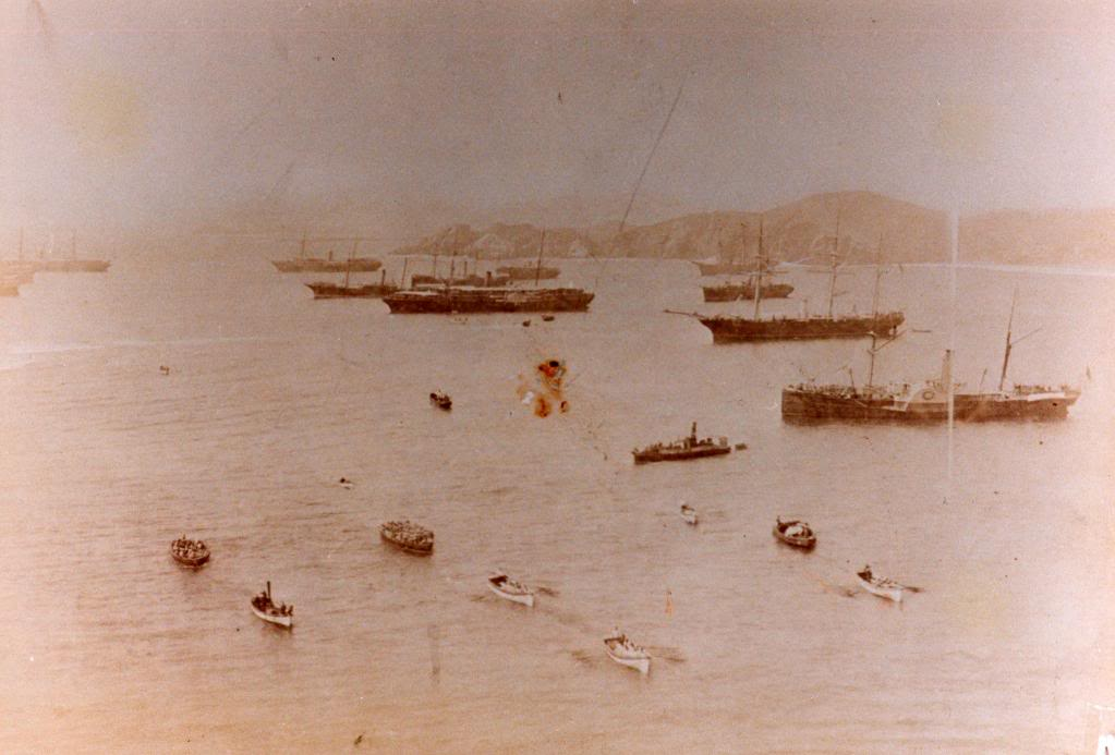 Desembarco chileno en Curayaco, Perú, durante la Guerra del Pacífico